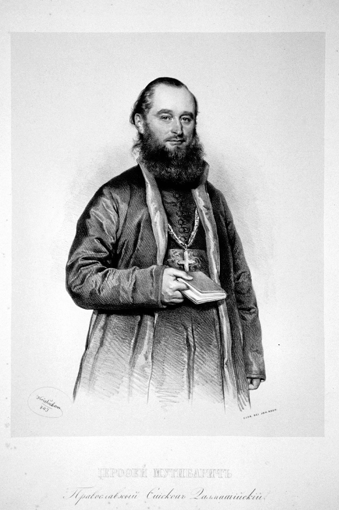 Hierotheus Mutibaric, griechisch unierter Bischof von Dalmatien um 1843.